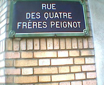 Plaque de la "rue des Quatre-Frères-Peignot", à Paris (XVe arrondissement)